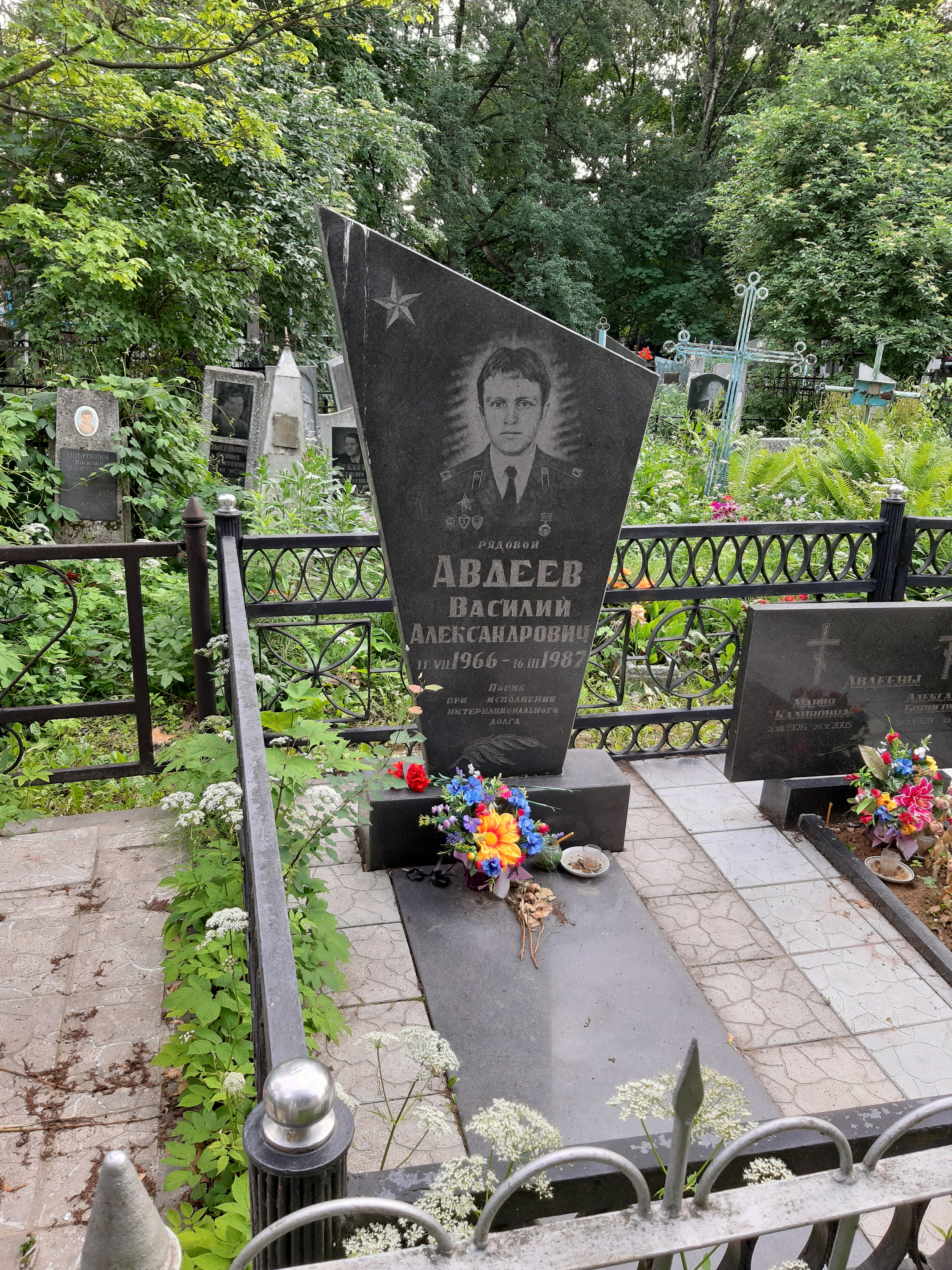 Магілёў. Машэкаўскія могілкі